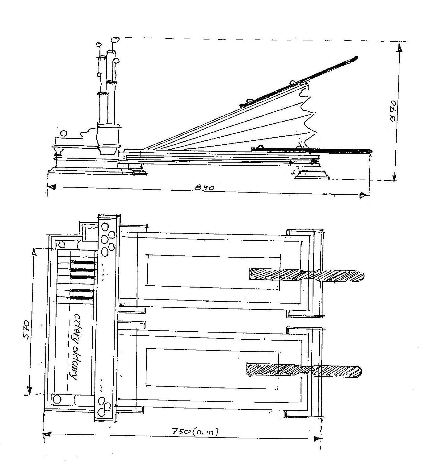 Schemat regału.